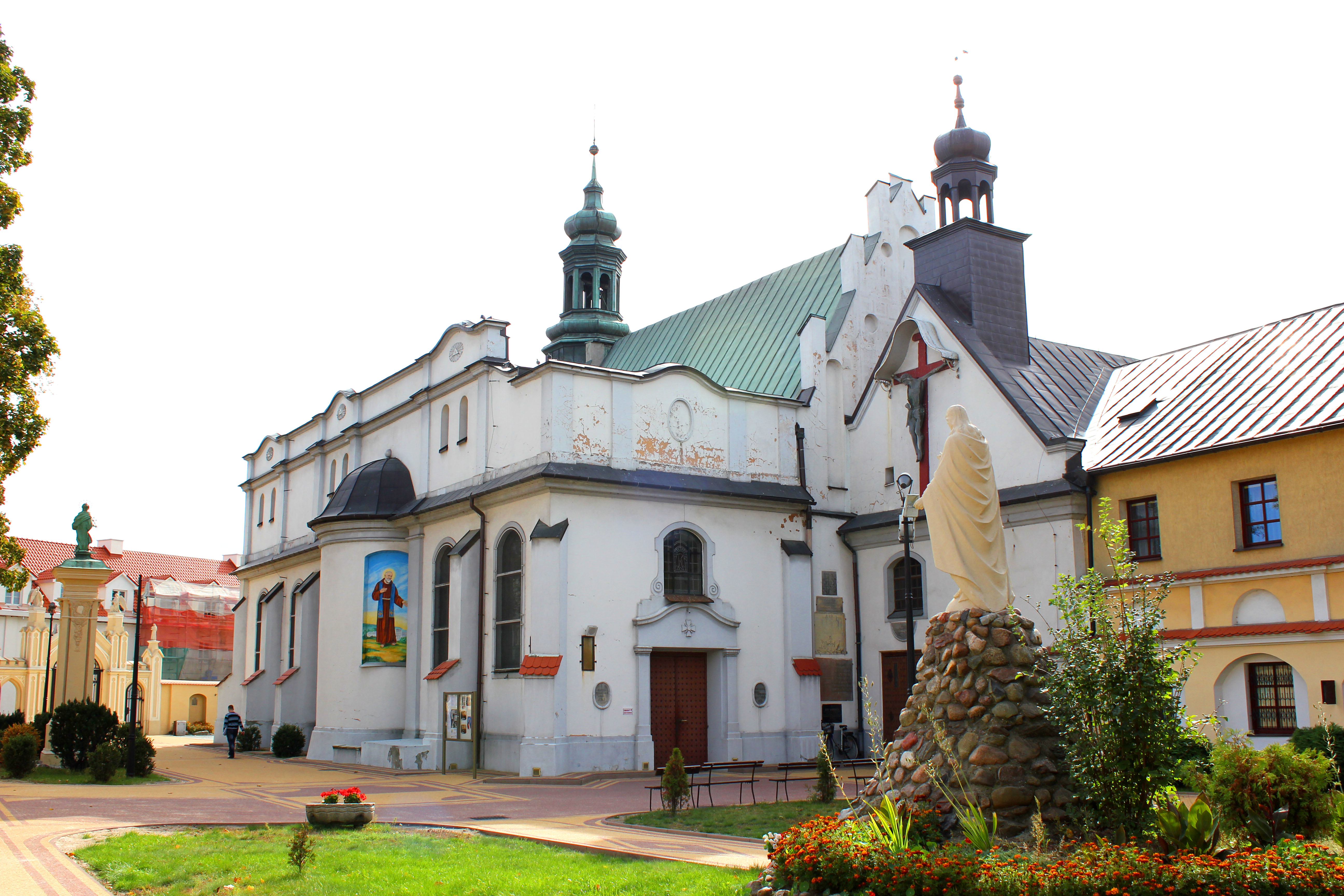 zespół klasztorny franciszkanów, XVII: kościół p.w. Wszystkich Świętych, klasztor Włocławek, pl. Wolności 6 (w rejestrze błędnie ul. Piwna 6), miasto Włocławek